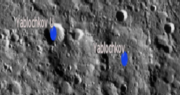 Cráter lunar Yablochkov. Cráteres satélite (Imagen LRO)